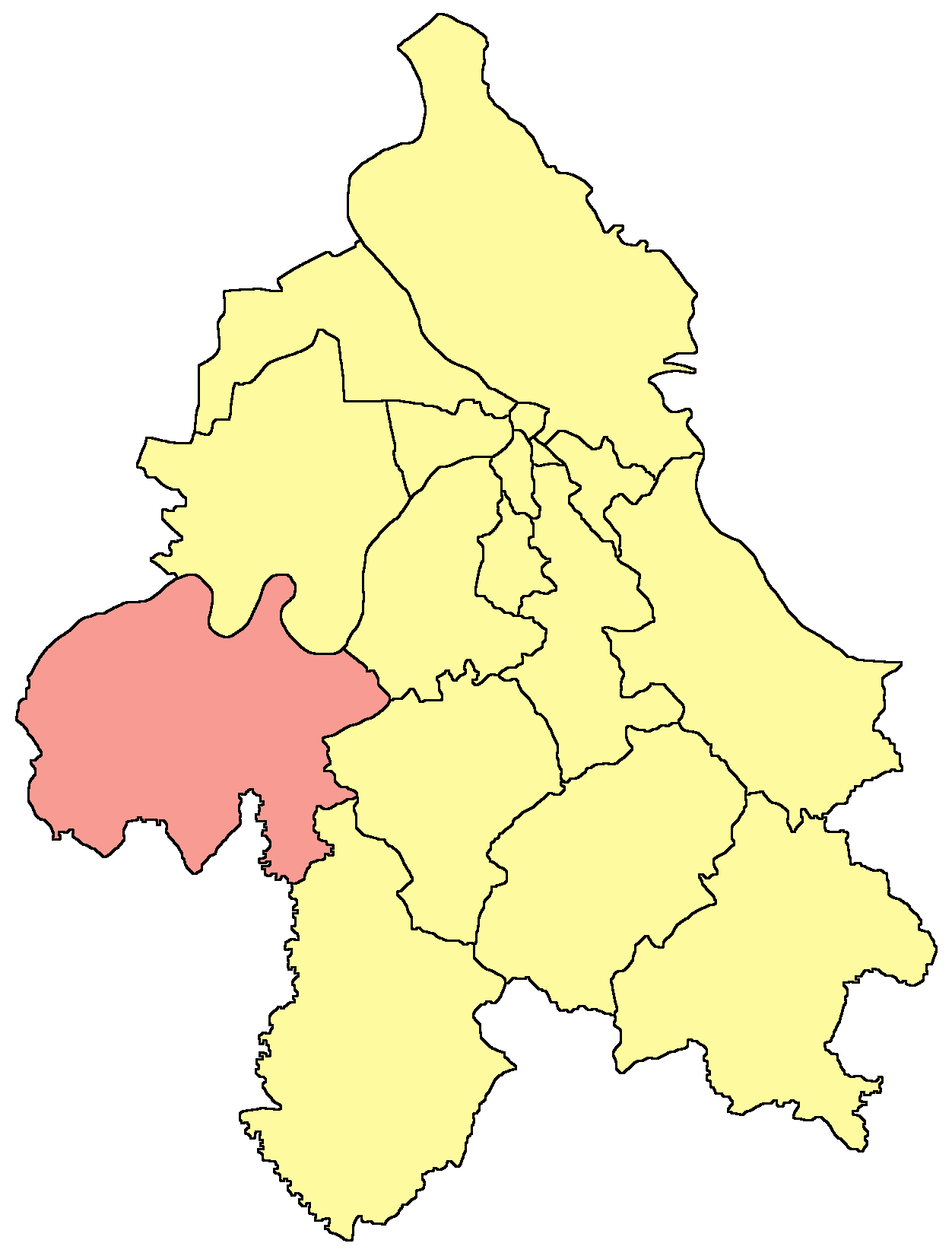 Belgrade municipality map